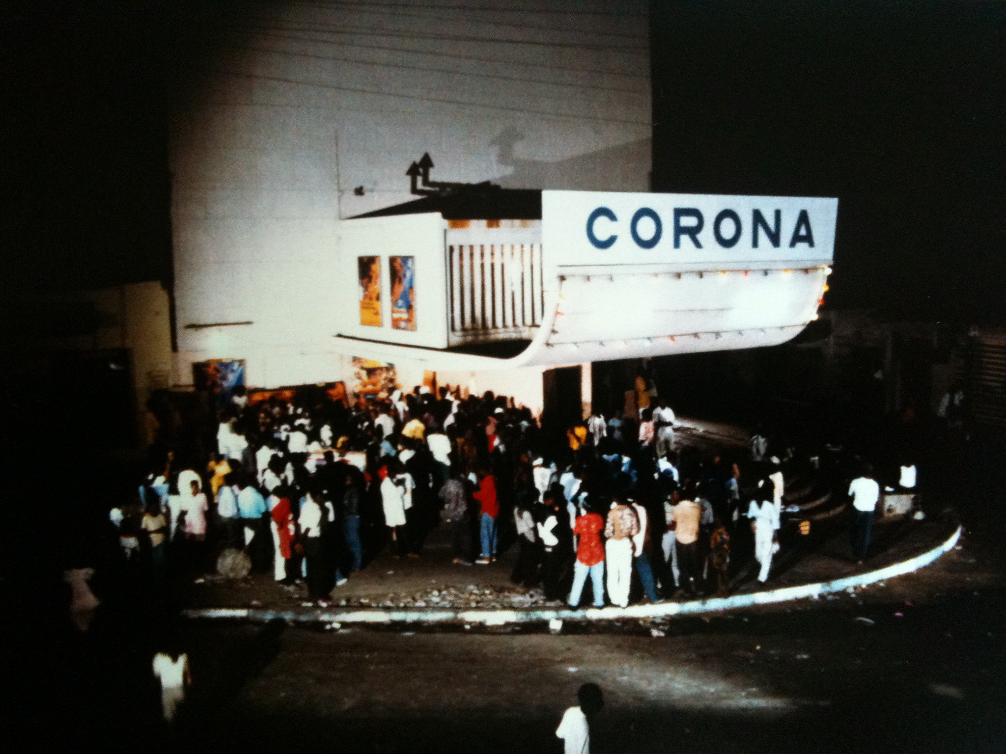 Tournage du documentaire Bandit Cinéma à Dakar